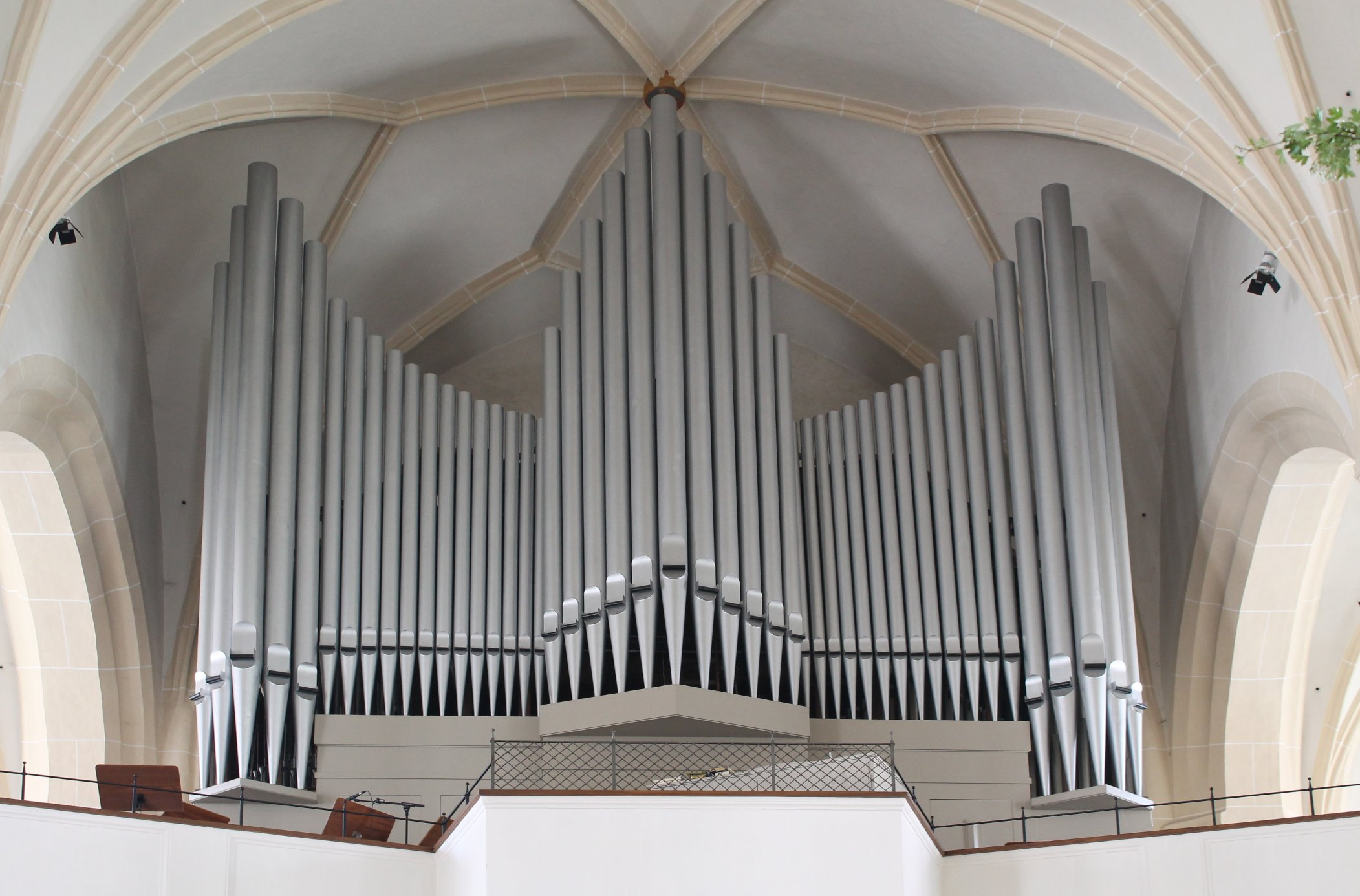 Orgel von St. Georg in Freising (1938, W. Siemann, III/42)